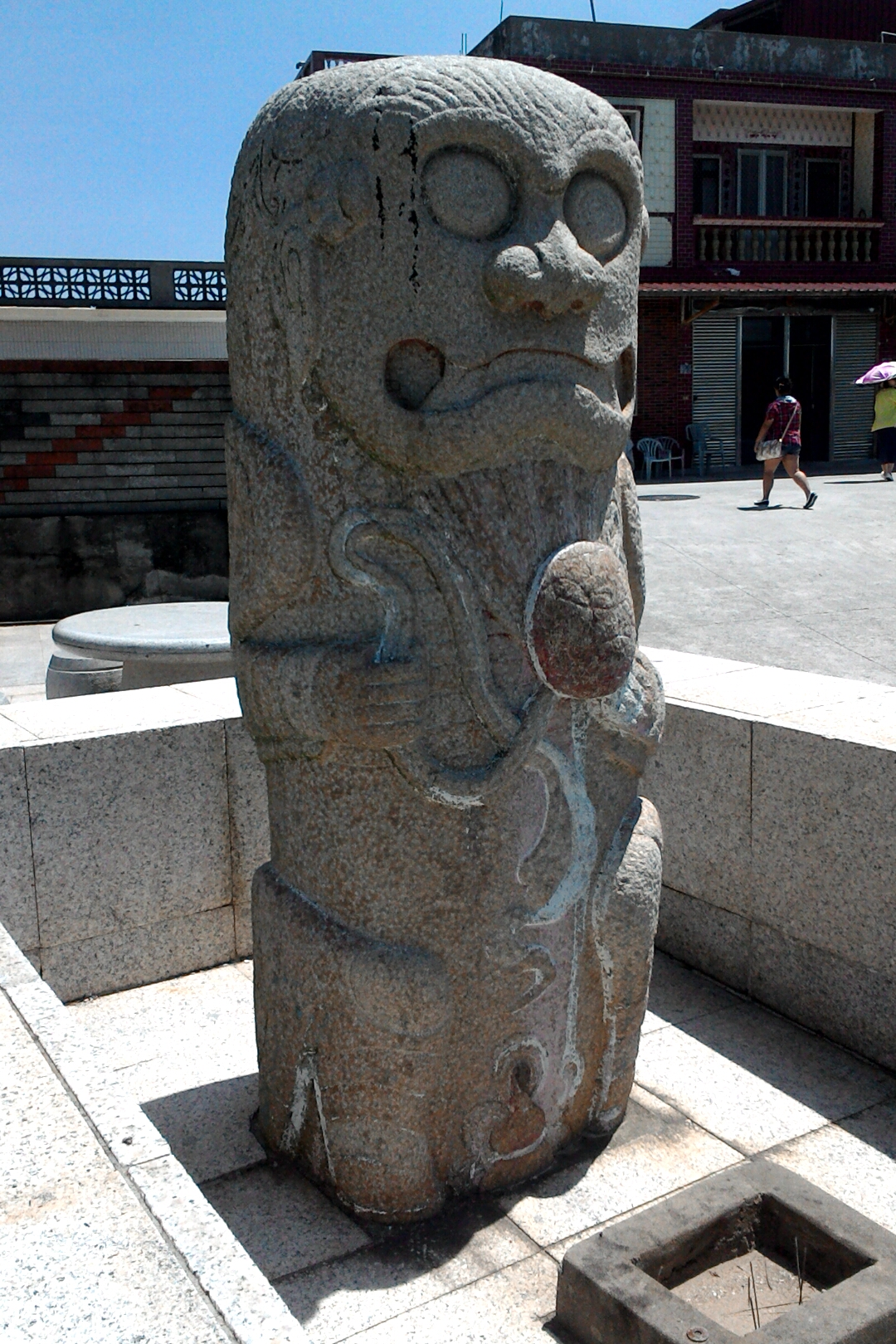 成功風獅爺,福建省金門縣金湖鎮正義里